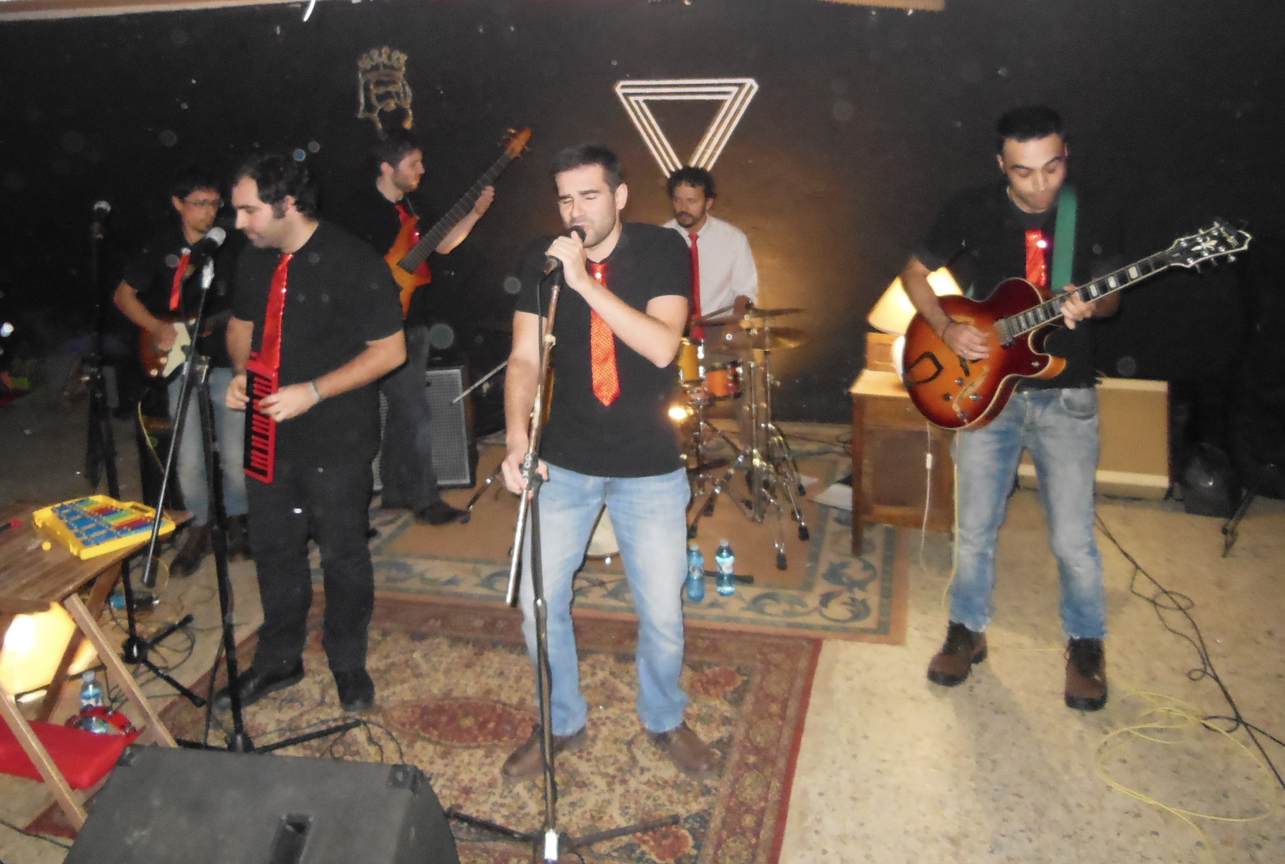 Ataque Escampe en concerto no Liceo Mutante